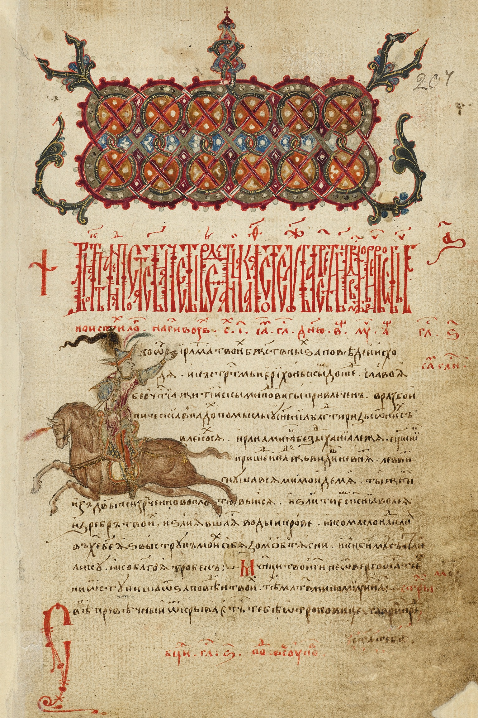 Псалтирь с восследованием («Буслаевская псалтирь») 1485–1490 гг.